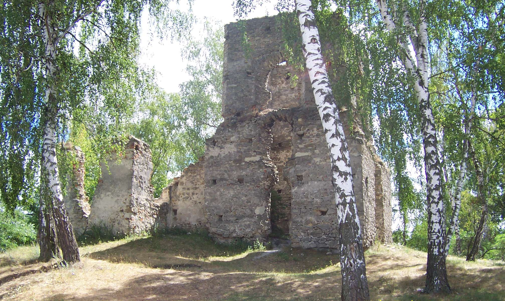 Ruiny zboru kalwińskiego w Łapczynej Woli 10.1956 and 426 from 21.06.1967.